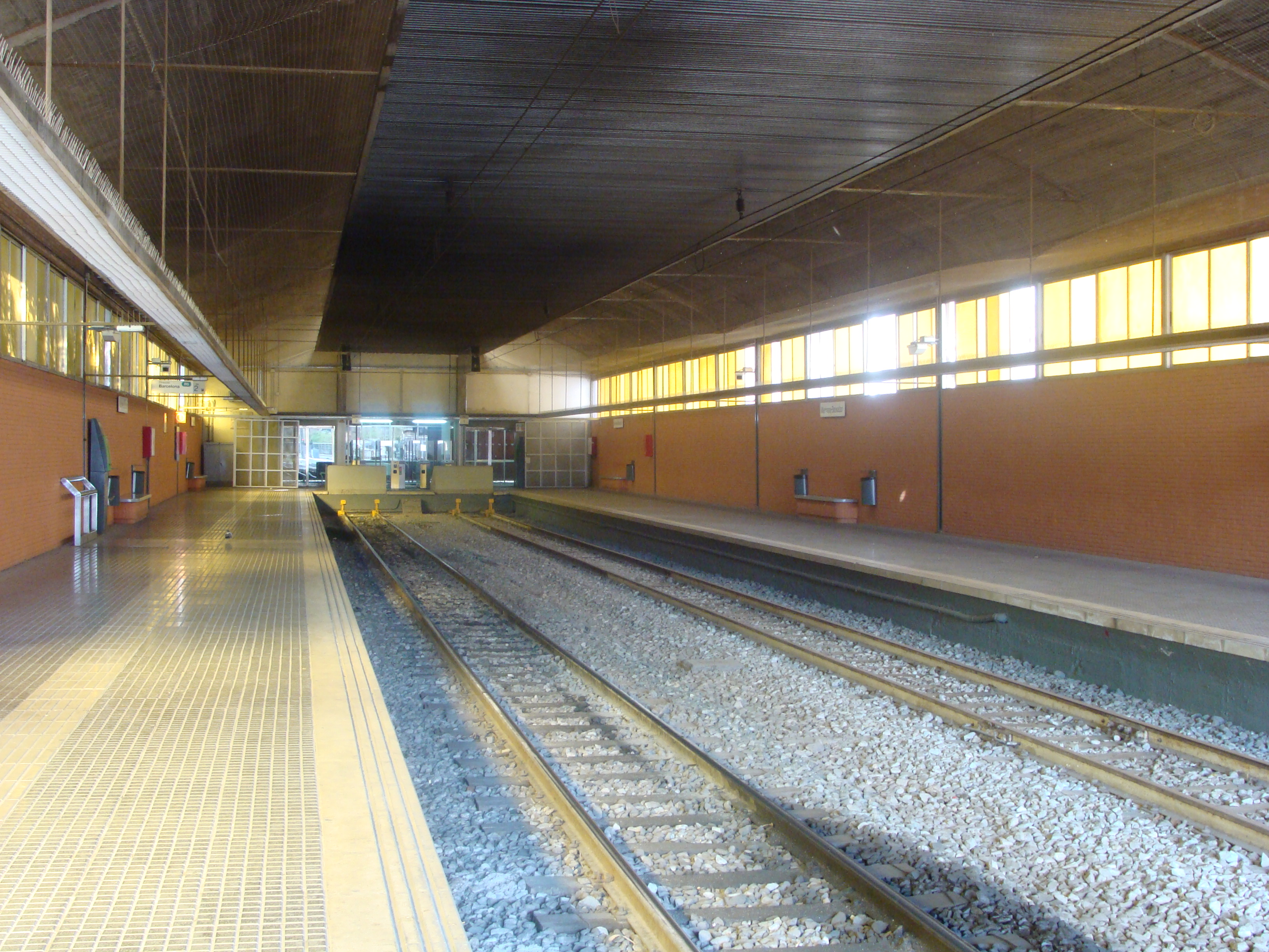 Vista de l'andana coberta de l'estació de Manresa-Baixador. Vista del andén cubierto de la estación de Manresa-Baixador.